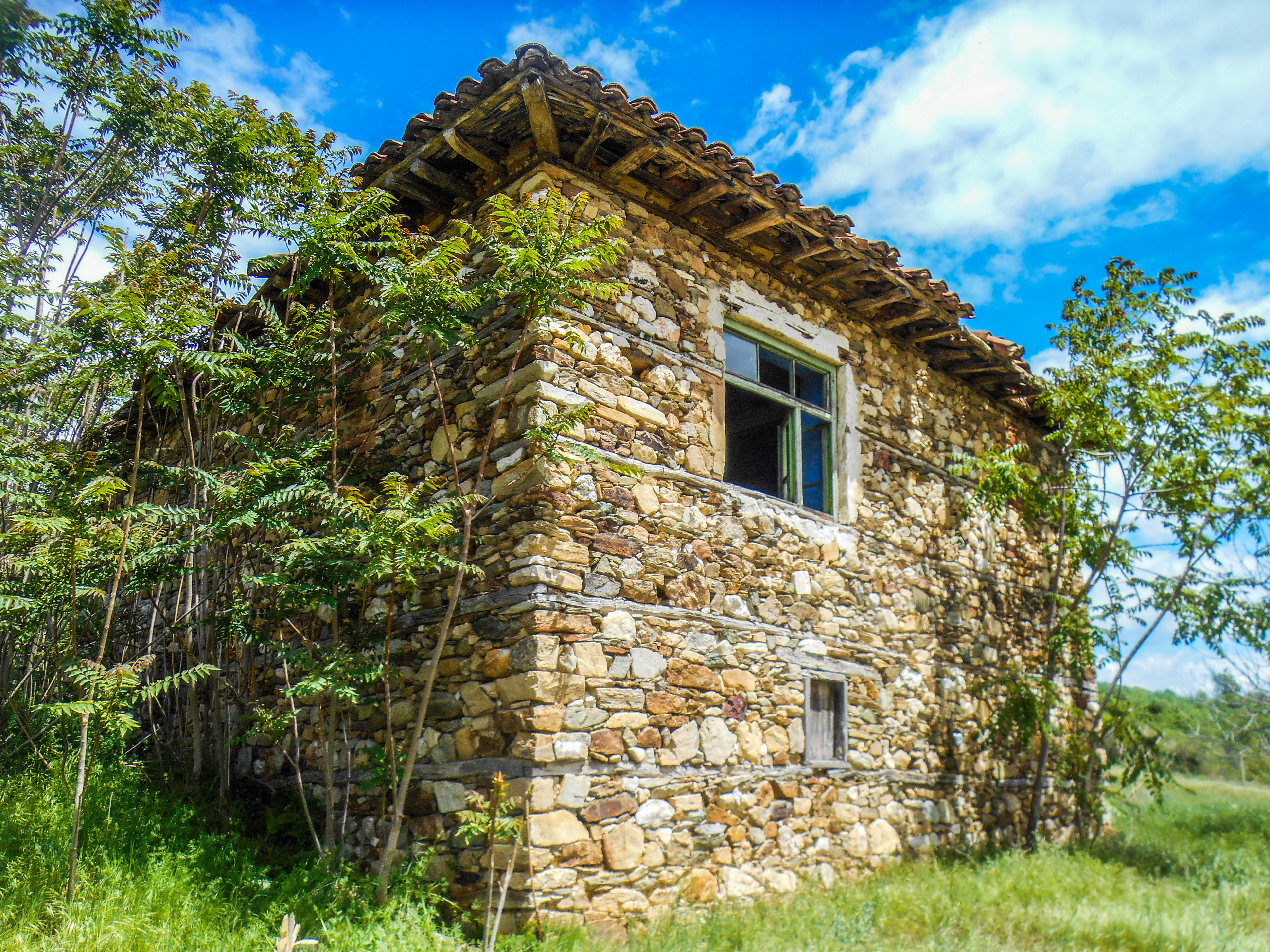 Куќа во Требичино